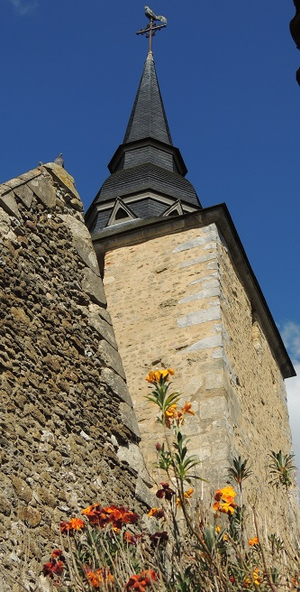 Église Saint-Cyr-et-Sainte-Julitte de Duneau, flèche du clocher en contre-plongée au pied du clocher avec premier plan fleuri